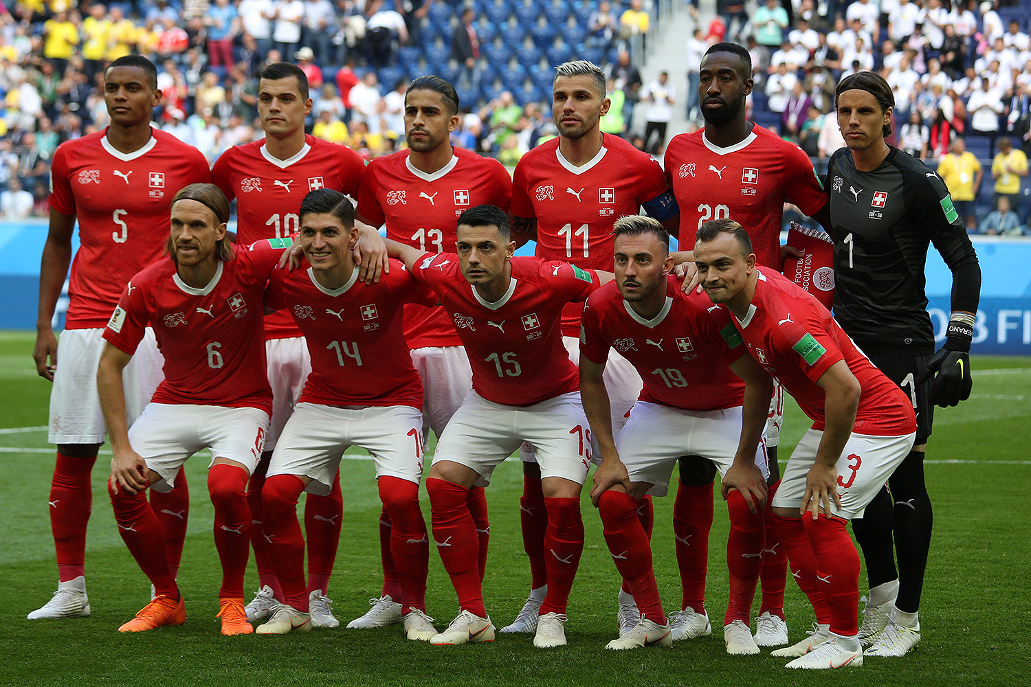 Сборная Швеции зрелищно вышла в четвертьфинал ЧМ-2018